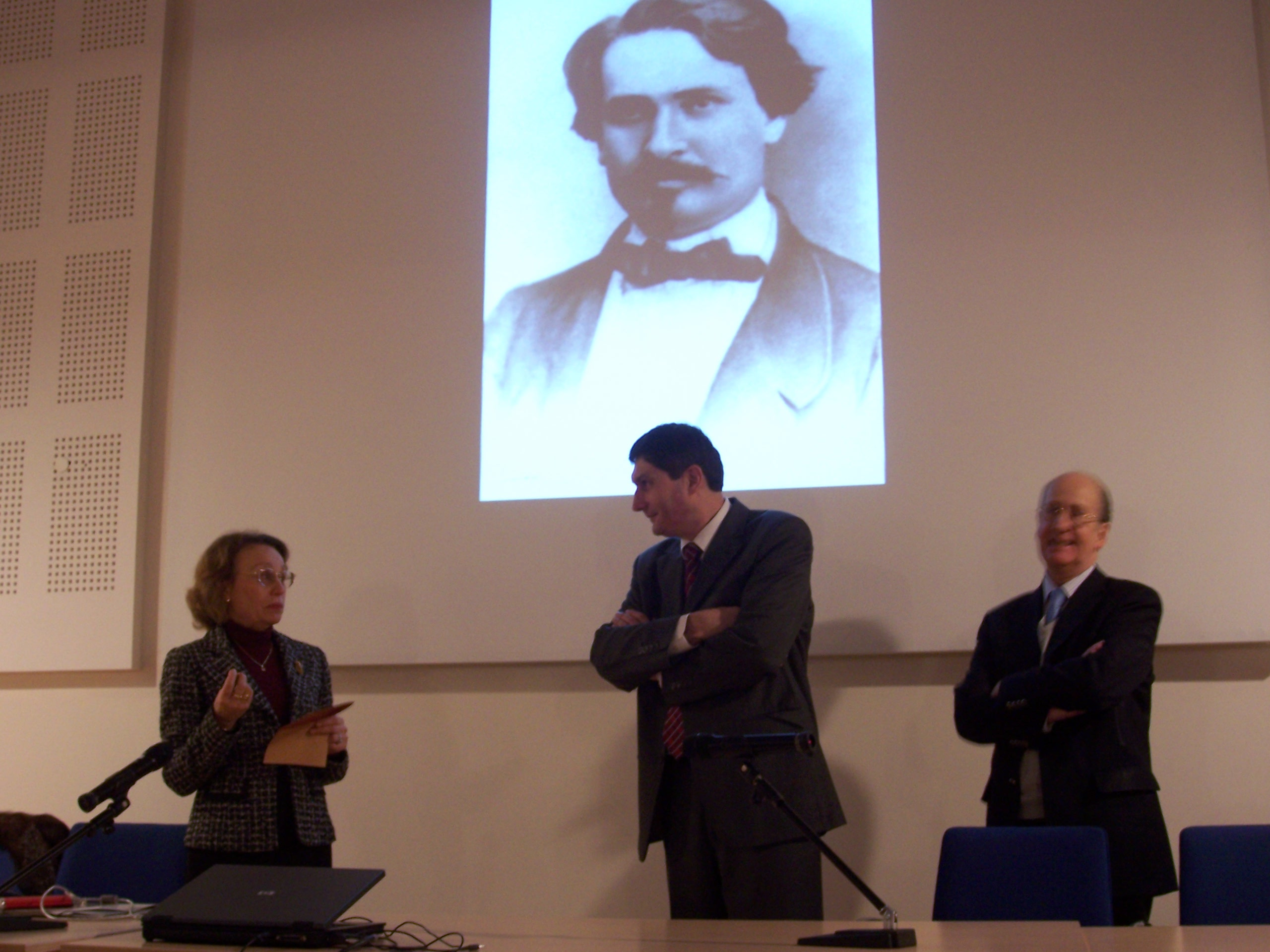 Le samedi 13 décembre 2008, à Sceaux (Hauts-de-Seine) a été remise, par Mme Pierrette BERENGIER, la cigale d'argent de Maître d'oeuvre du Félibrige à M. Jean-François COSTES devant une assemblée fournie et devant (en arrière plan) le portrait de Frédéric MISTRAL.